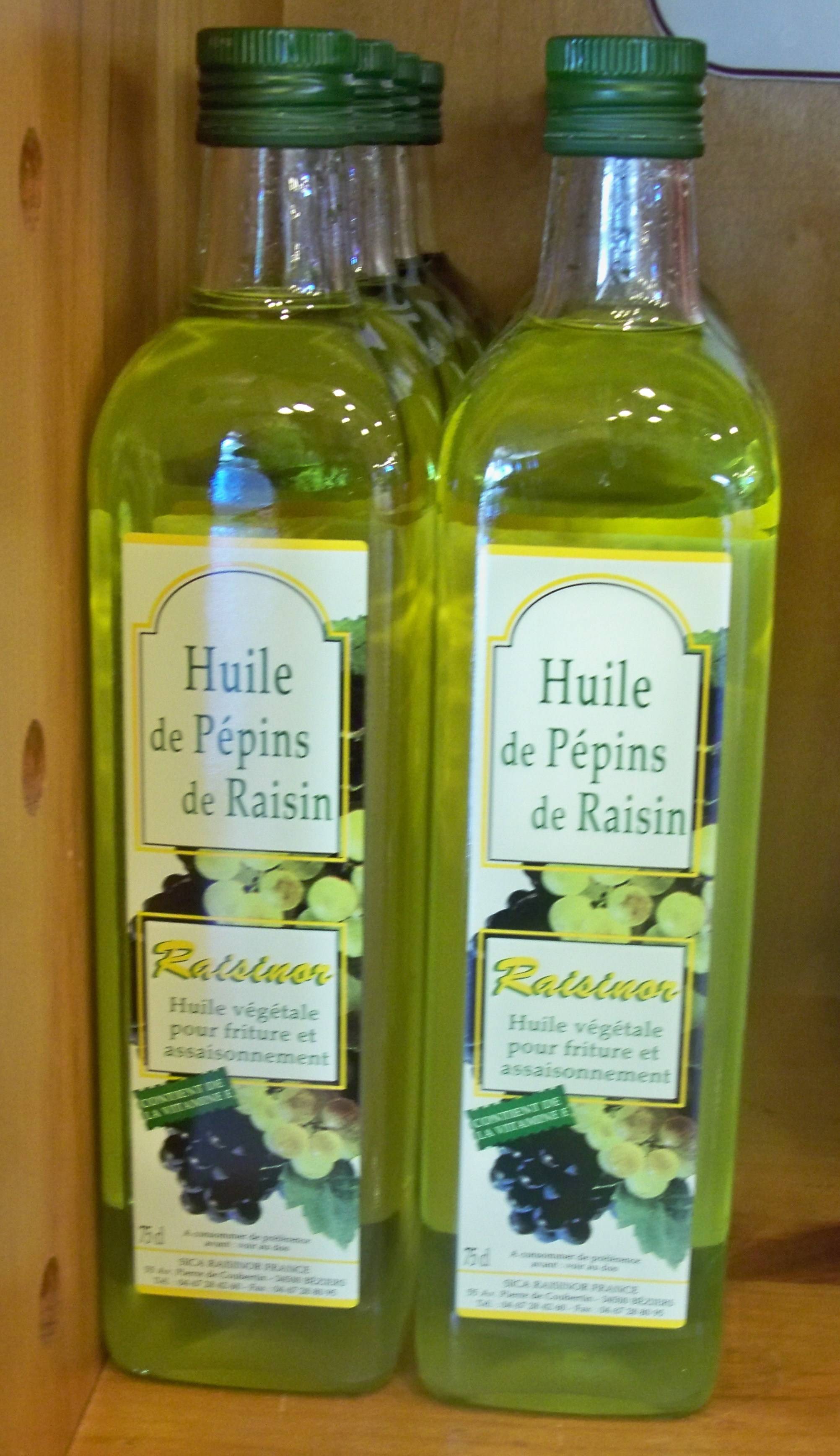 Bouteille d'huile de pépins de raisins